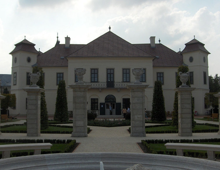 Érseki Palota Hajóson. Unknown